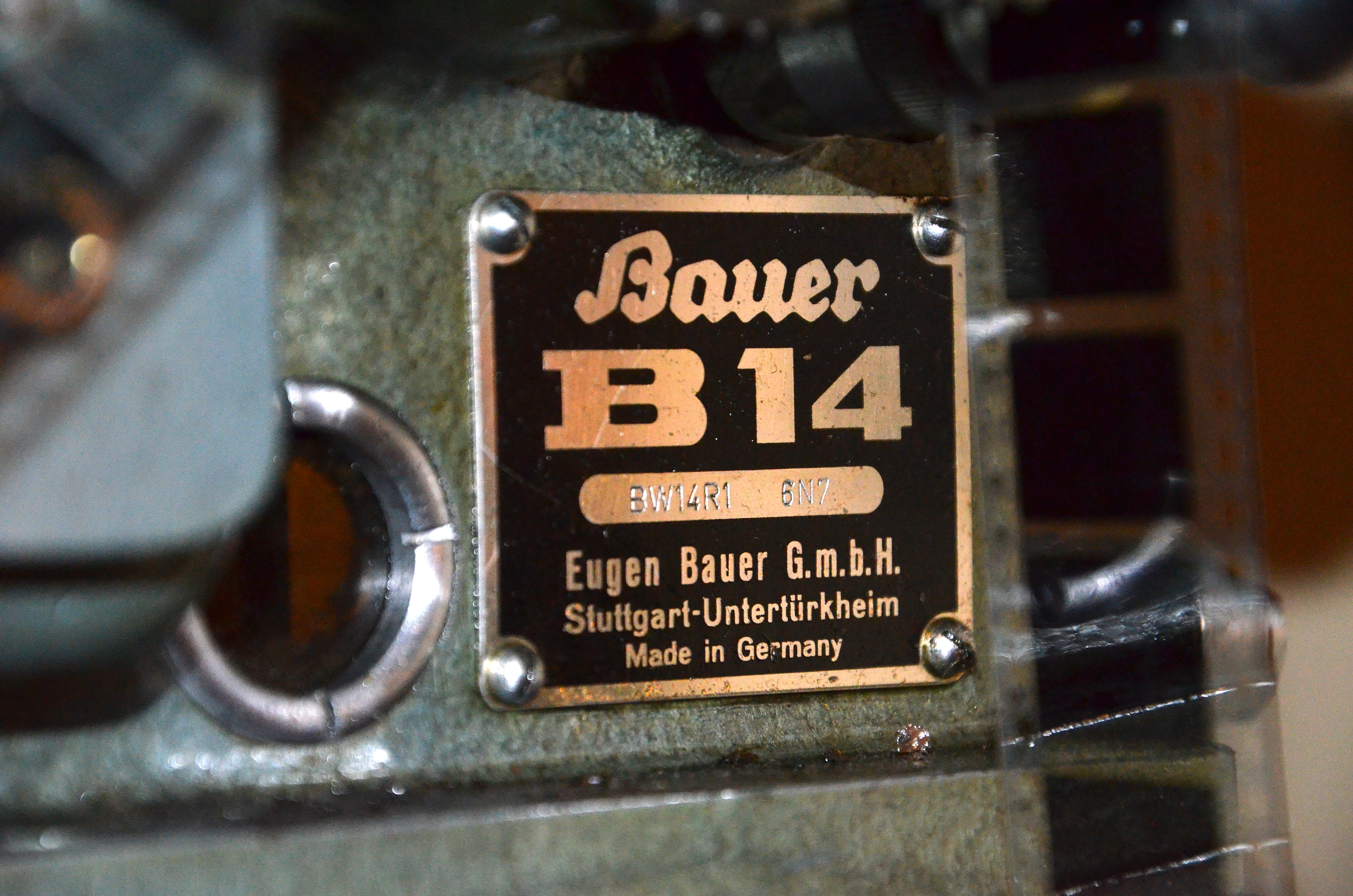 Während des Festivals der Philosophie 2014 zeigte das Kino im Sprengel in der Nordstadt von Hannover den Film Der Prozeß von Orson Welles. Dieses Foto zeigt ein paar Einzelbilder eines Aktes einer Filmrolle der deutschsprachigen Version vor dem Typenschild mit der Aufschrift "Bauer B 14 BW14R1 6N7 Eugen Bauer G.m.b.H. Stuttgart-Untertürkheim Made in Germany ...